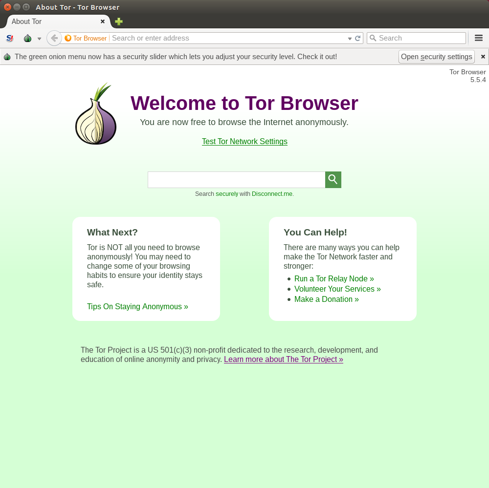 Tor Browser i Ubuntu